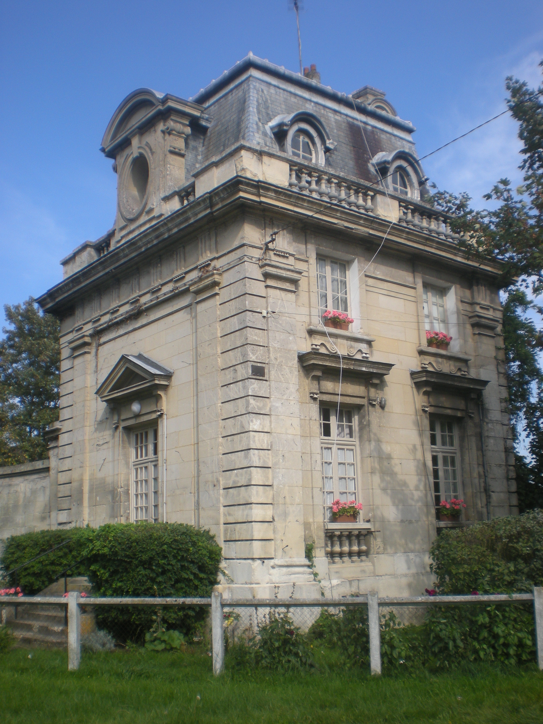 bâtiment de l'ancienne entrée du domaine du château de Fitz-James